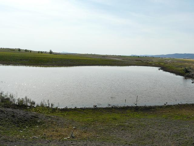 Ojos del Guadiana. Zuacorta 2012 mayo